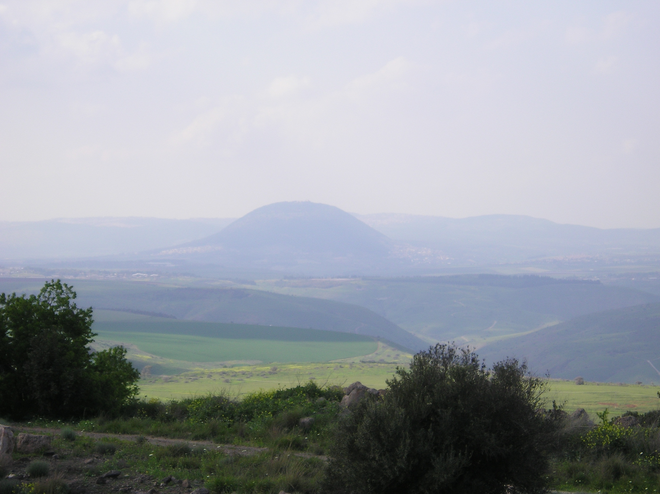 Belvoir (twierdza) - Teren izraelskiego parku narodowego. Widok na Dolinę Ezdrelon i Górę Tabor.